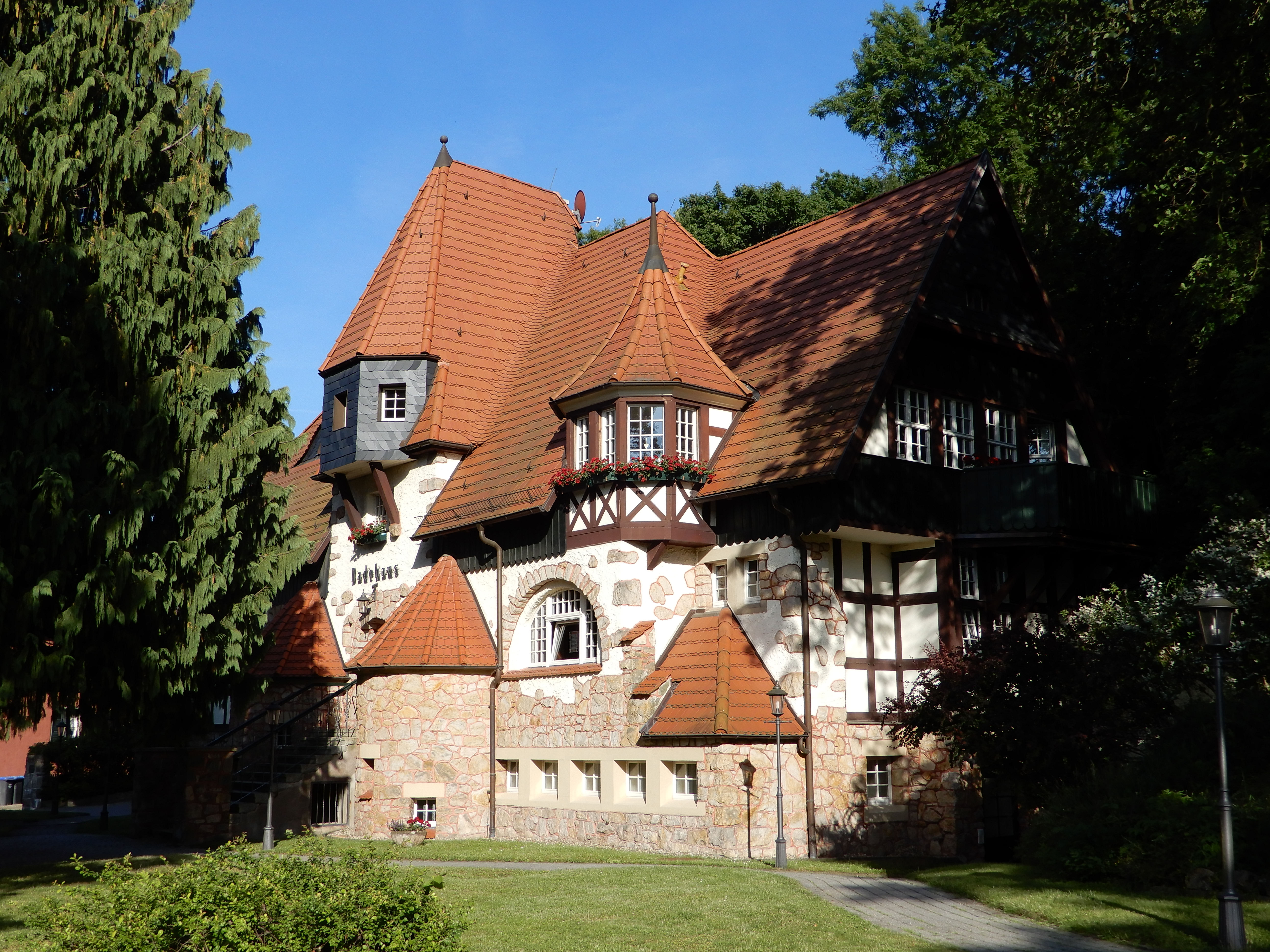 Badehaus Lindenallee 1a (Ballenstedt)